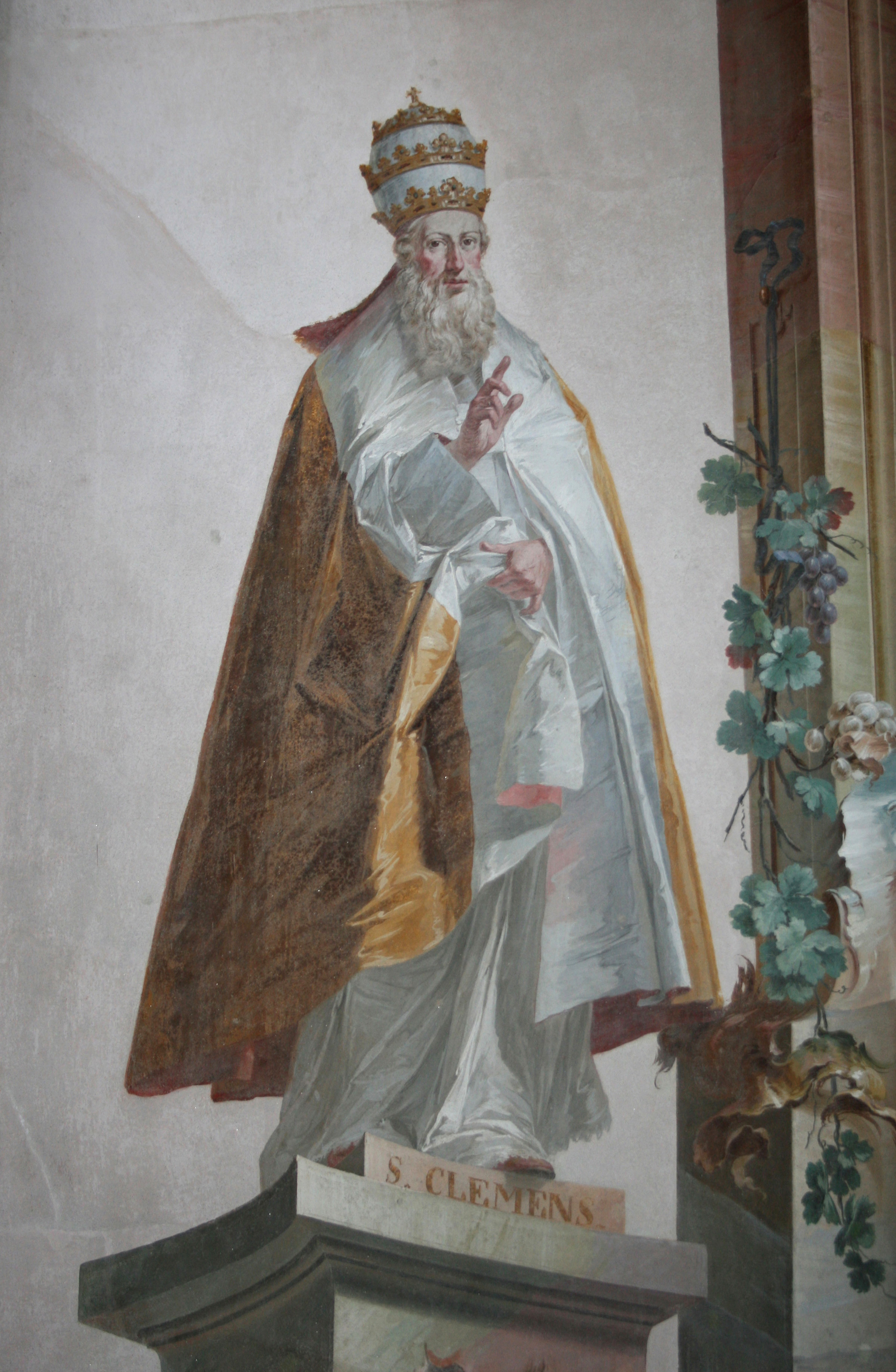 Affresco raffigurante San Clemente papa, opera di Biaigo Bellotti del 1742-1745. Situato accanto sul lato sinistro dell'altare della chiesa di San Gregorio Magno in Camposanto a Busto Arsizio.